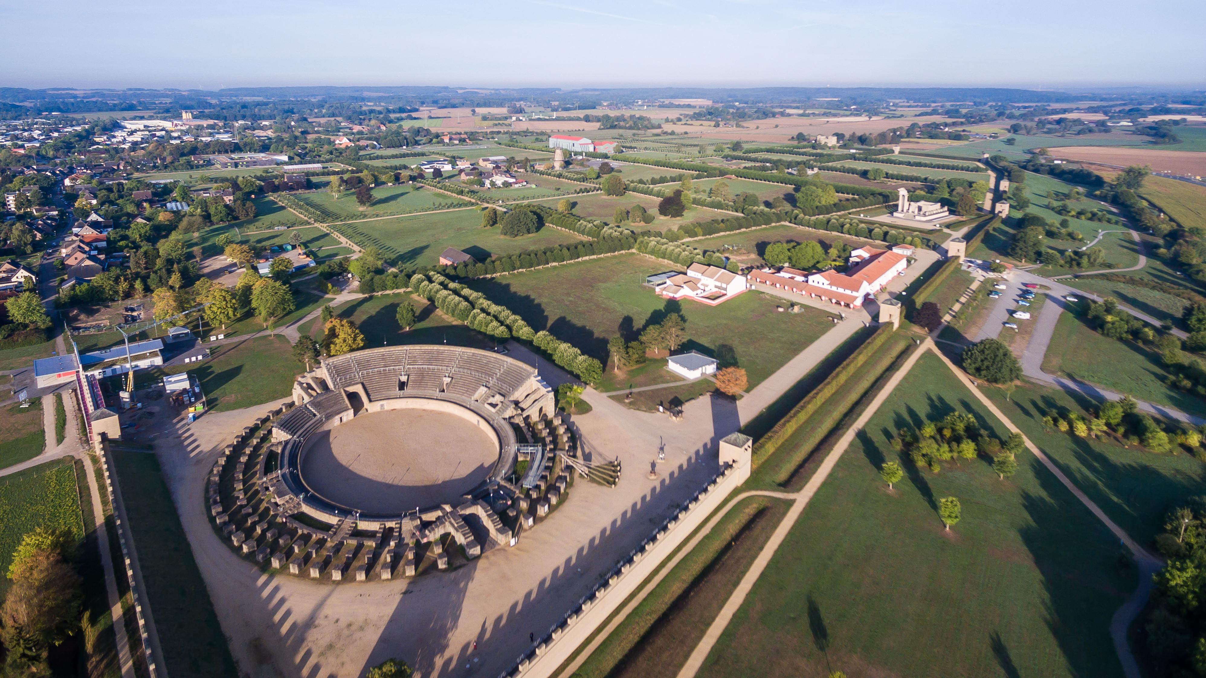 Colonia Ulpia Traiana.. LVR-Archäologischer Park Xanten. Luftaufnahme mit einem Quadkopter